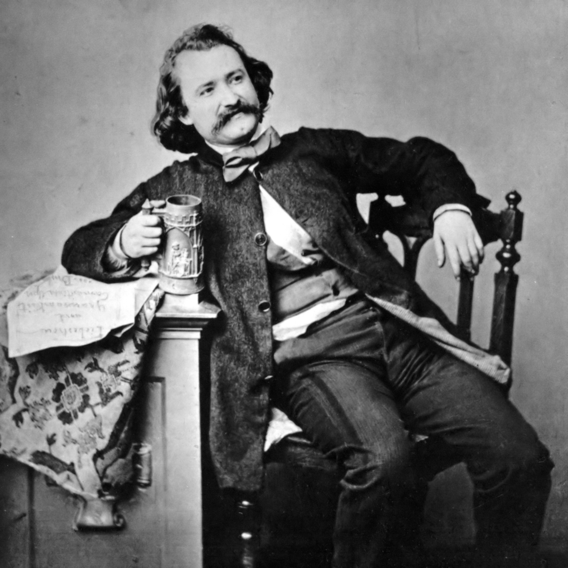 Wilhelm Busch (1832-1908)